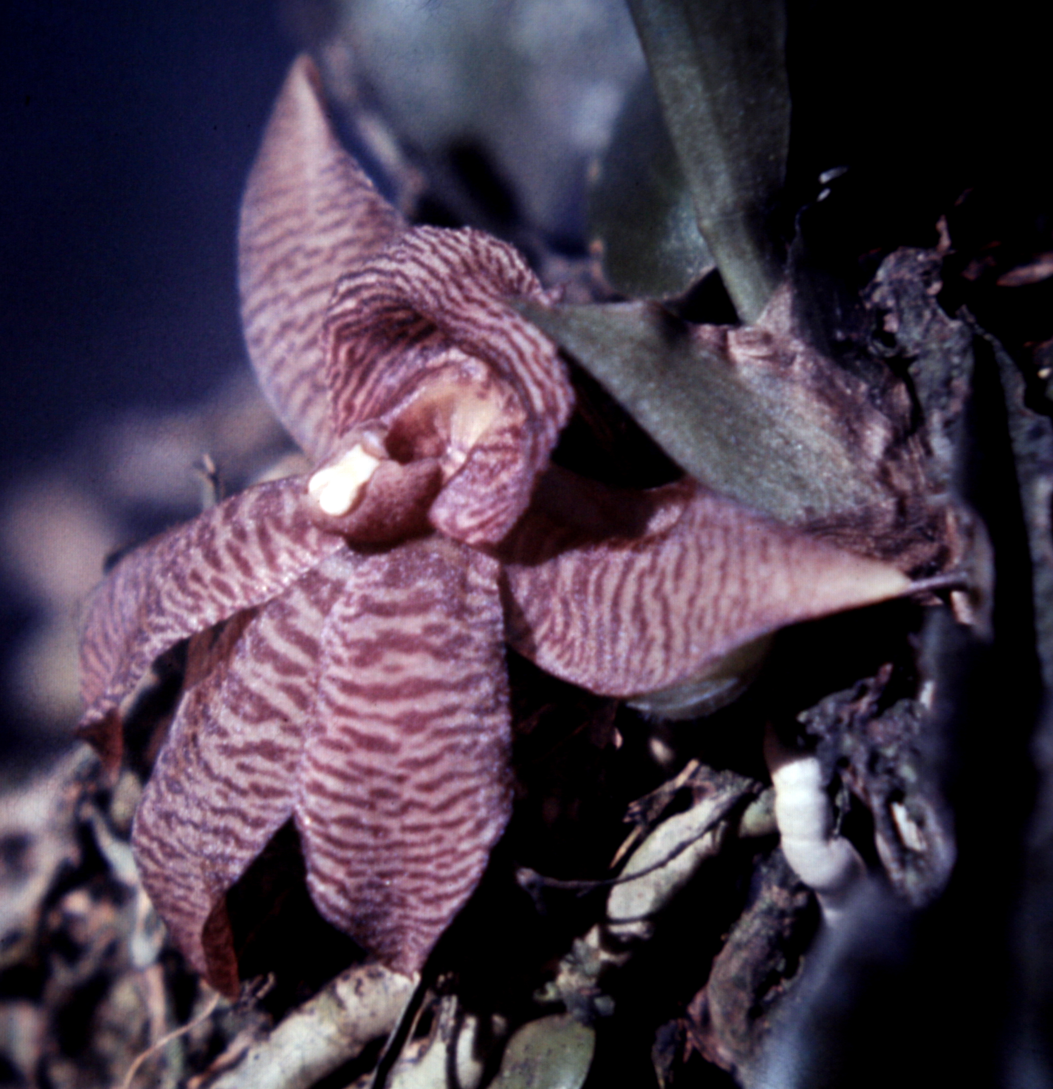 Chaubardiella tigrina, Suriname.